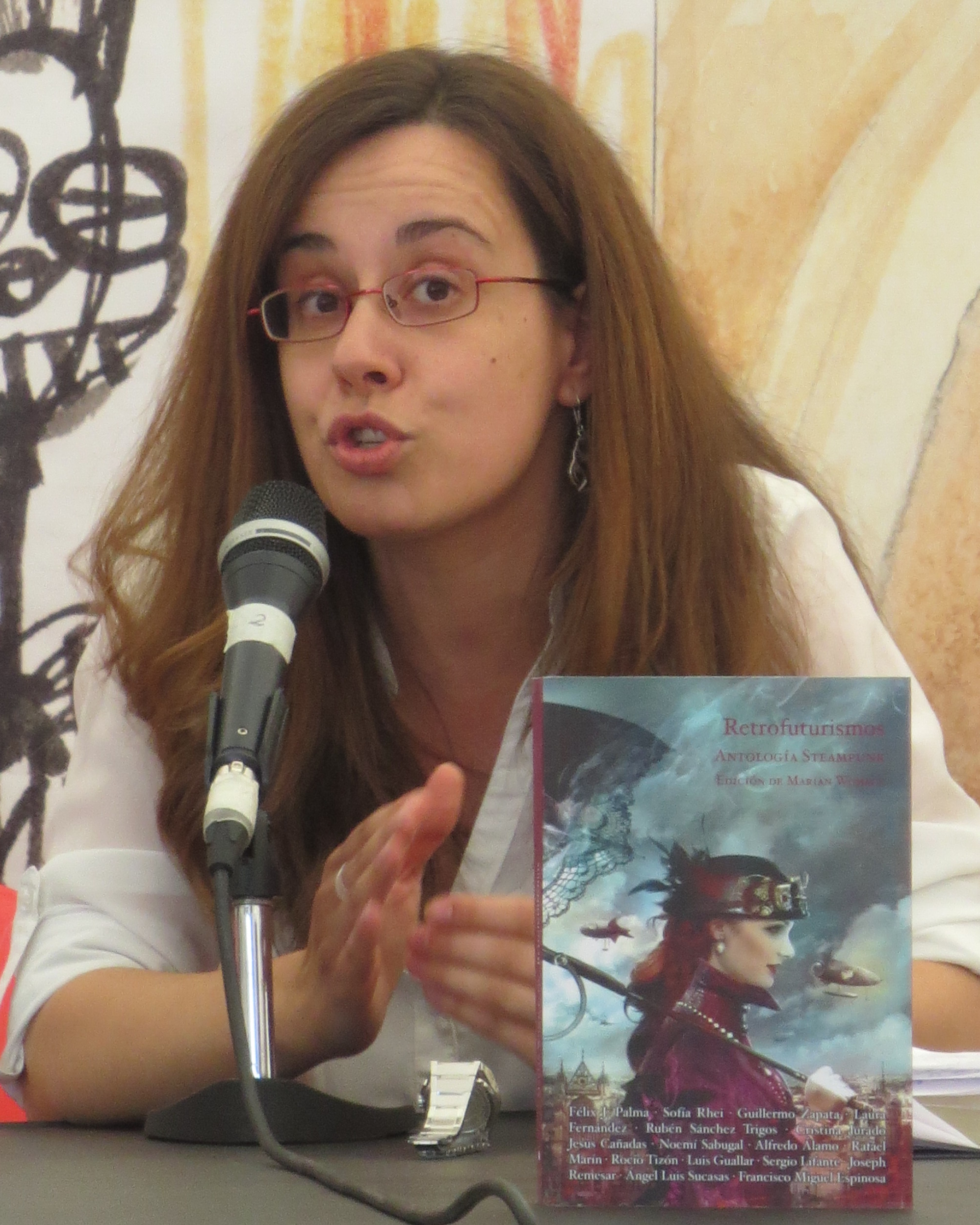 La escritora Noemí Sabugal en una presentación en la Semana Negra de Gijón.